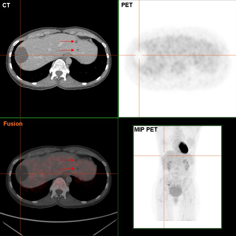 Eine große und zwei sehr kleine Leberzysten in der FDG PET/CT-Darstellung. Die Zysten reichern kein FDG und kein CT-Kontrastmittel an.